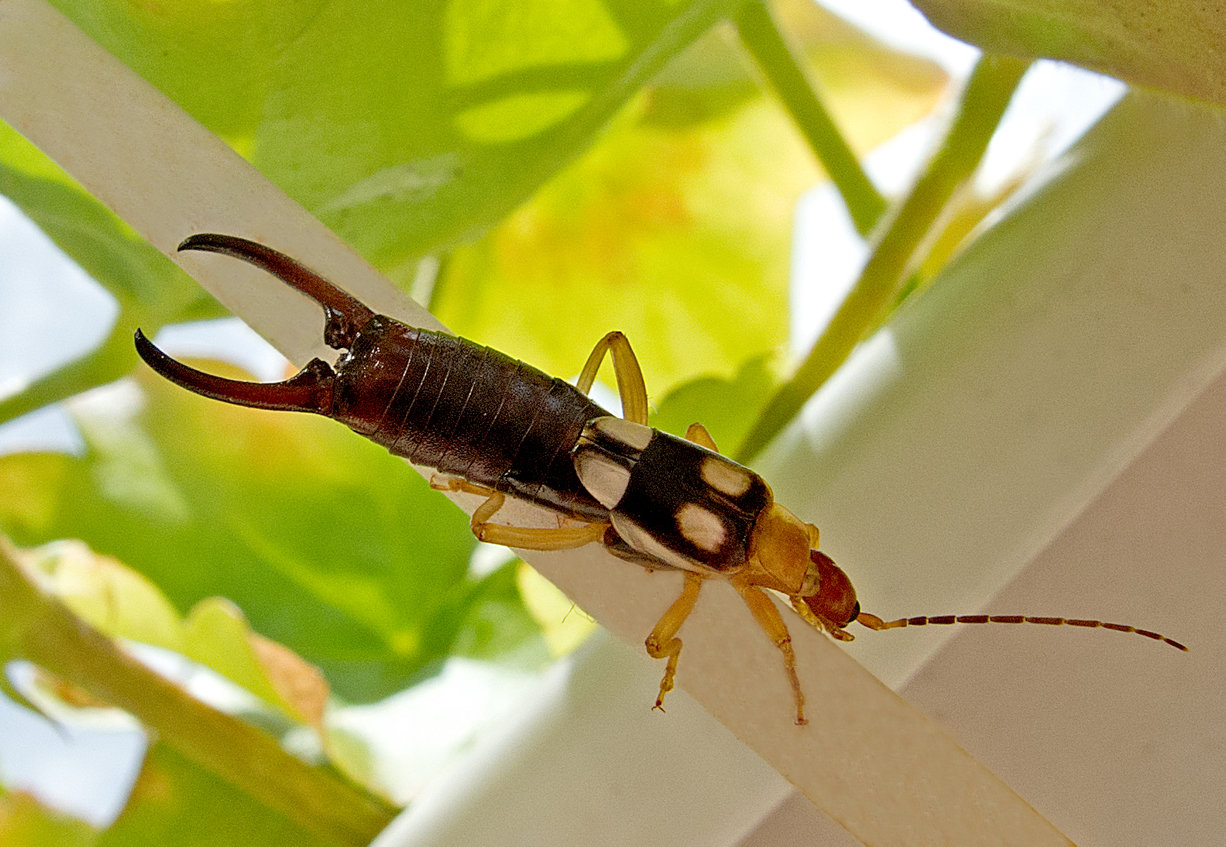 Earwigs are found throughout the Americas, Africa, Eurasia, Australia and New Zealand, about 2,000 species. Earwigs are mostly nocturnal and often hide in small, moist crevices during the day, and are active at night, feeding on a wide variety of insects and plants. Word «earwig» in different languages mean "Pierce ears" or something similar. It is a common myth that earwigs crawl into the human ear and lay eggs in the brain. Despite the menacing appearance earwig can not harm humans directly. Forceps are not strong enough to injure the skin and it can not bite or transmit disease. Earwigs are among the few non-social insect species that show maternal care. Unlike most insects, the female keeps the eggs and nymphs have hatched and feeding the same month and a half, until they are on their own. Уховертки встречаются в Америке, Африке, Евразии, Австралии и Новой Зеландии, их существует около 2000 видов. Ведут в основном ночной образ жизни и часто скрываются в маленьких, влажных расщелинах в течение дня и активны в ночное время, питаясь самыми разнообразными насекомыми и растениями. Названия уховёрток в различных языках означают «проткни уши» или нечто подобное. Это распространенный миф, что уховертки заползают в человеческое ухо и откладывают яйца в головном мозге)). Несмотря на угрожающий внешний вид, уховертка не может вредить людям напрямую. Клещи (церки) на конце хвоста недостаточно сильны, чтобы повредить кожу, и она не может укусить или передавать болезни. Уховертки являются одними из немногих видов несоциальных насекомых, которые проявляют материнскую заботу. В отличие от большинства насекомых, самка полтора месяца охраняет отложенные яйца и вылупившиеся нимфы и подкармливает их, пока они не станут самостоятельными.